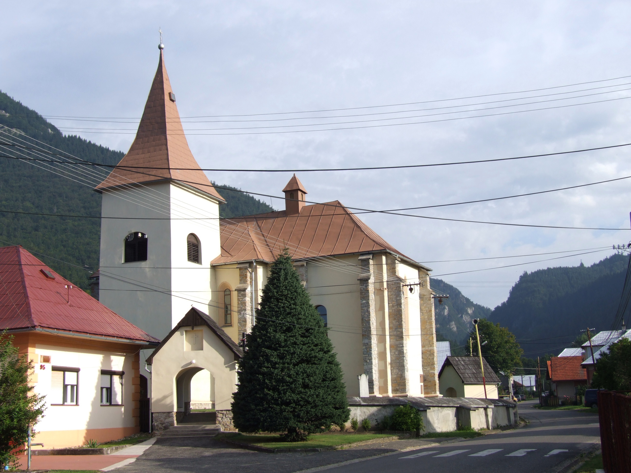 Kvačany in Liptovský Mikuláš District